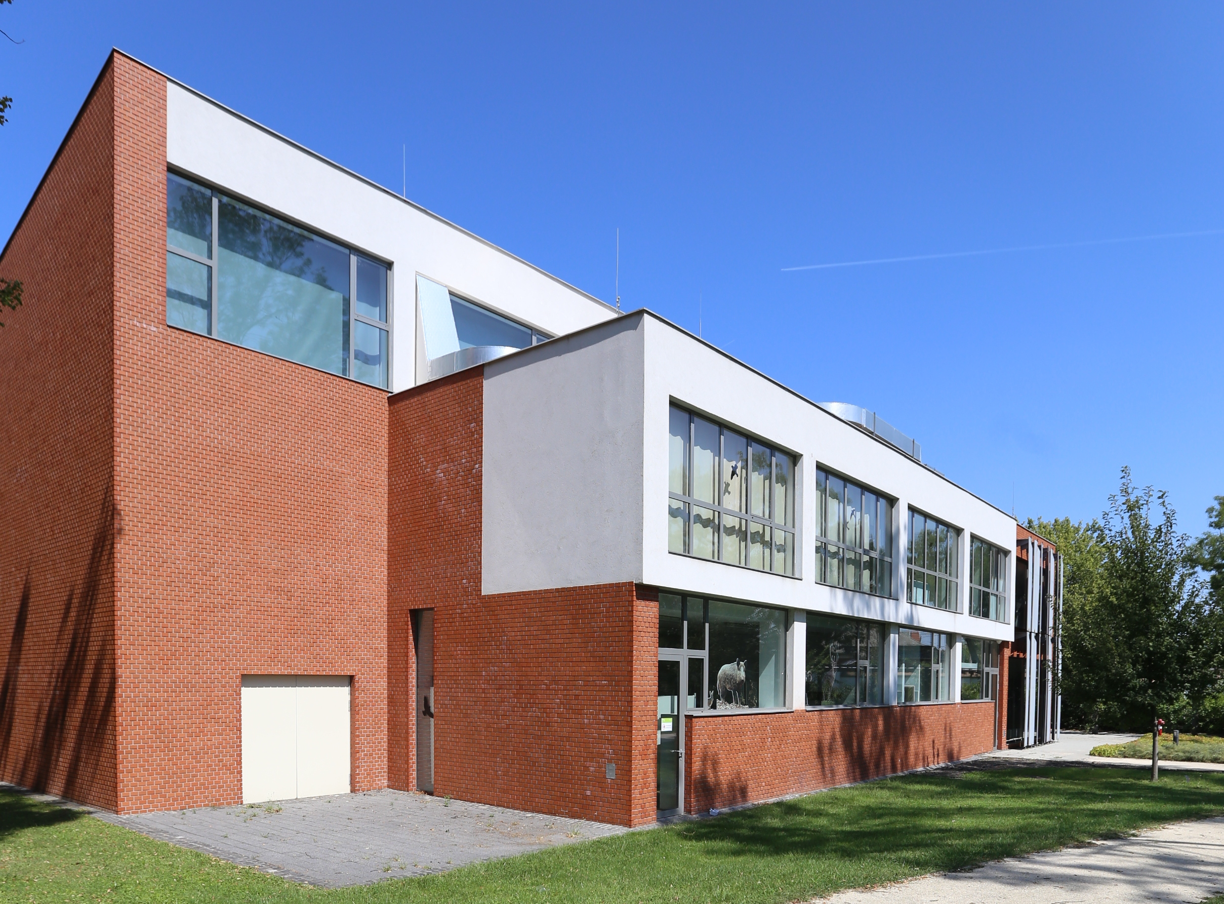 Vadászti Élménytér, Hatvan.